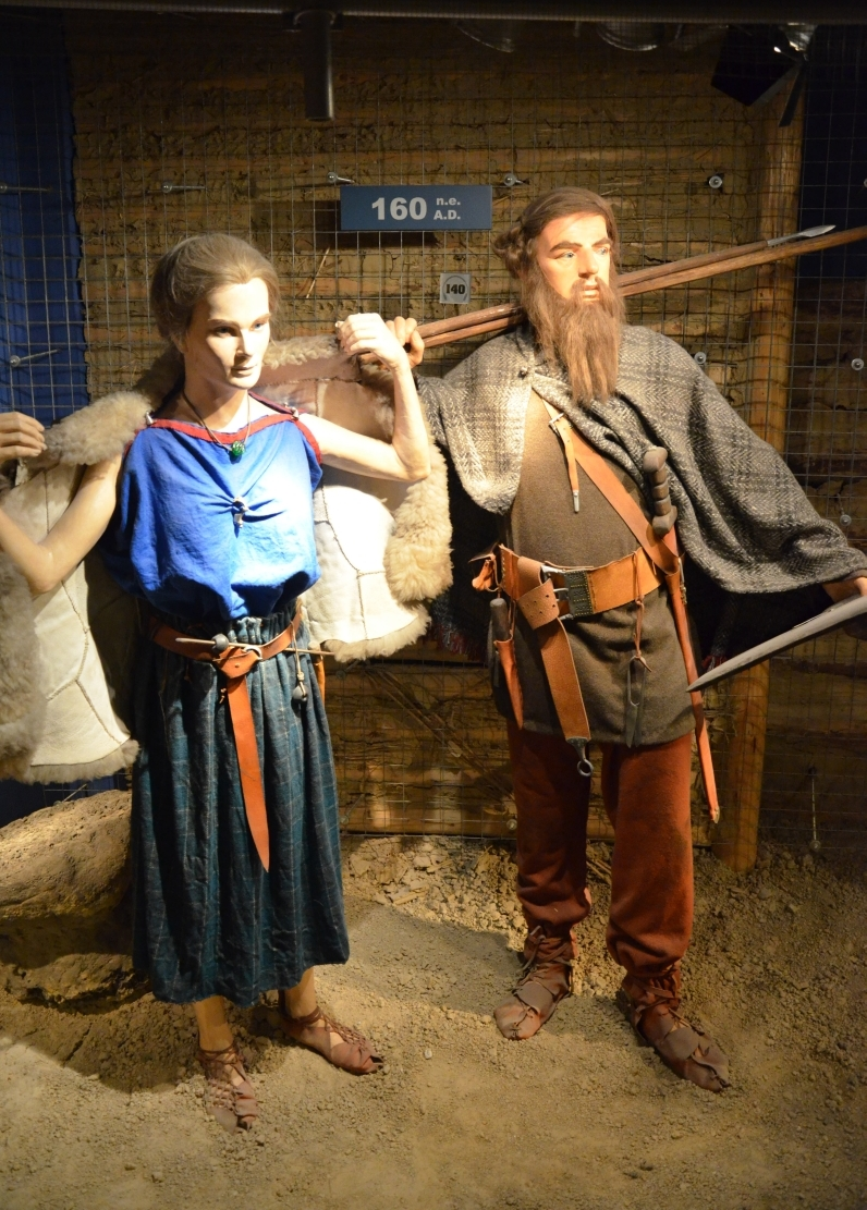 Rekonstruktionsversuch wandalischer Trachten